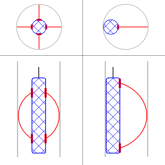 Схема расположения рессор для центрирования геофизического зонда в скважине и для прижатия зонда к стенке скважины